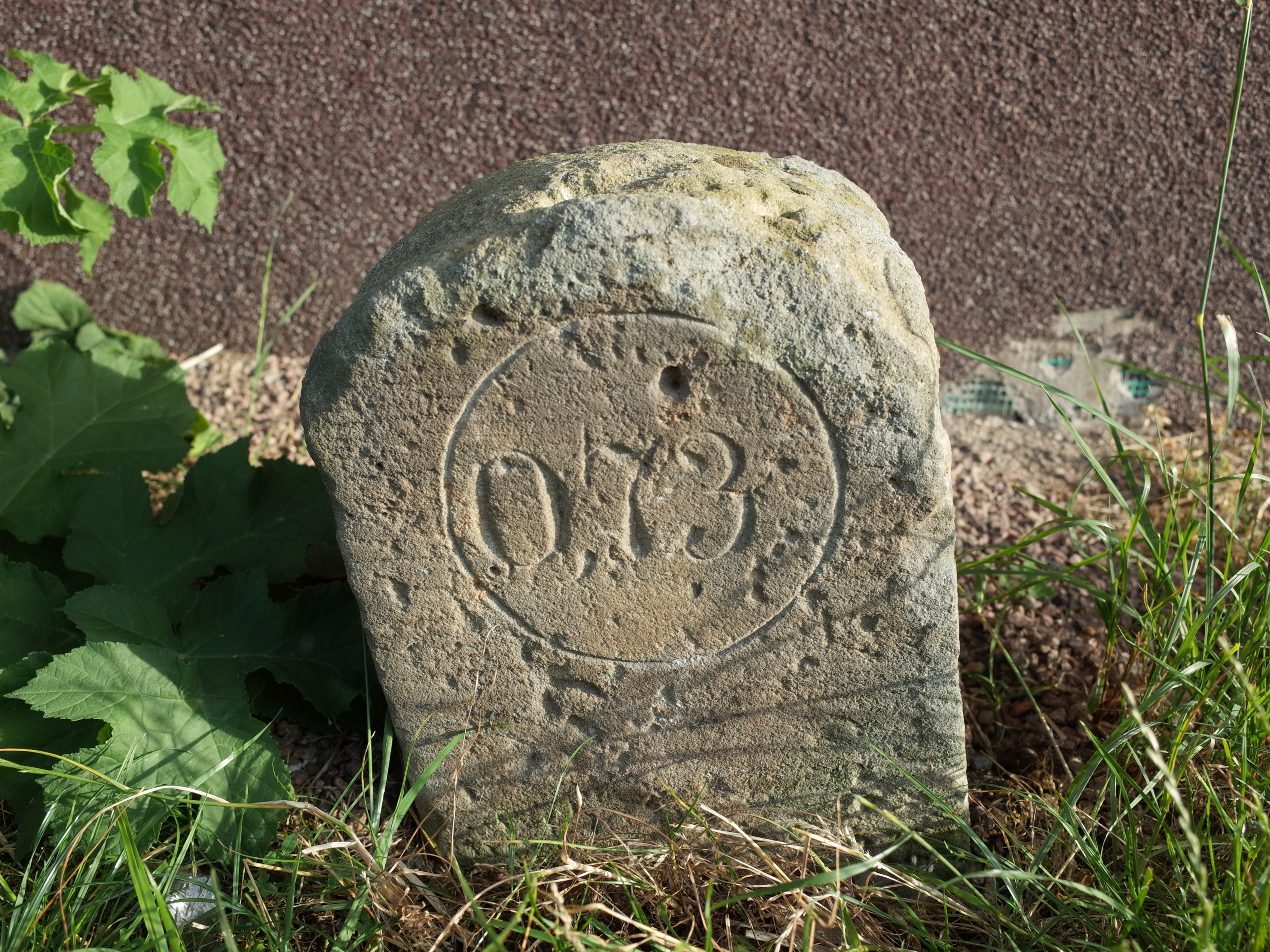 Anhaltischer Stationsstein (Distanzstein) Nr. 0,73.